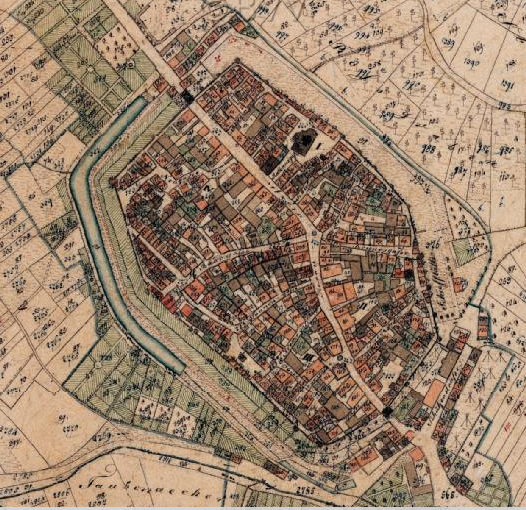 Kartenausschnitt Urkataster Bayern, Altstadt Mainbernheim, 1. Hälfte 19. Jahrhundert